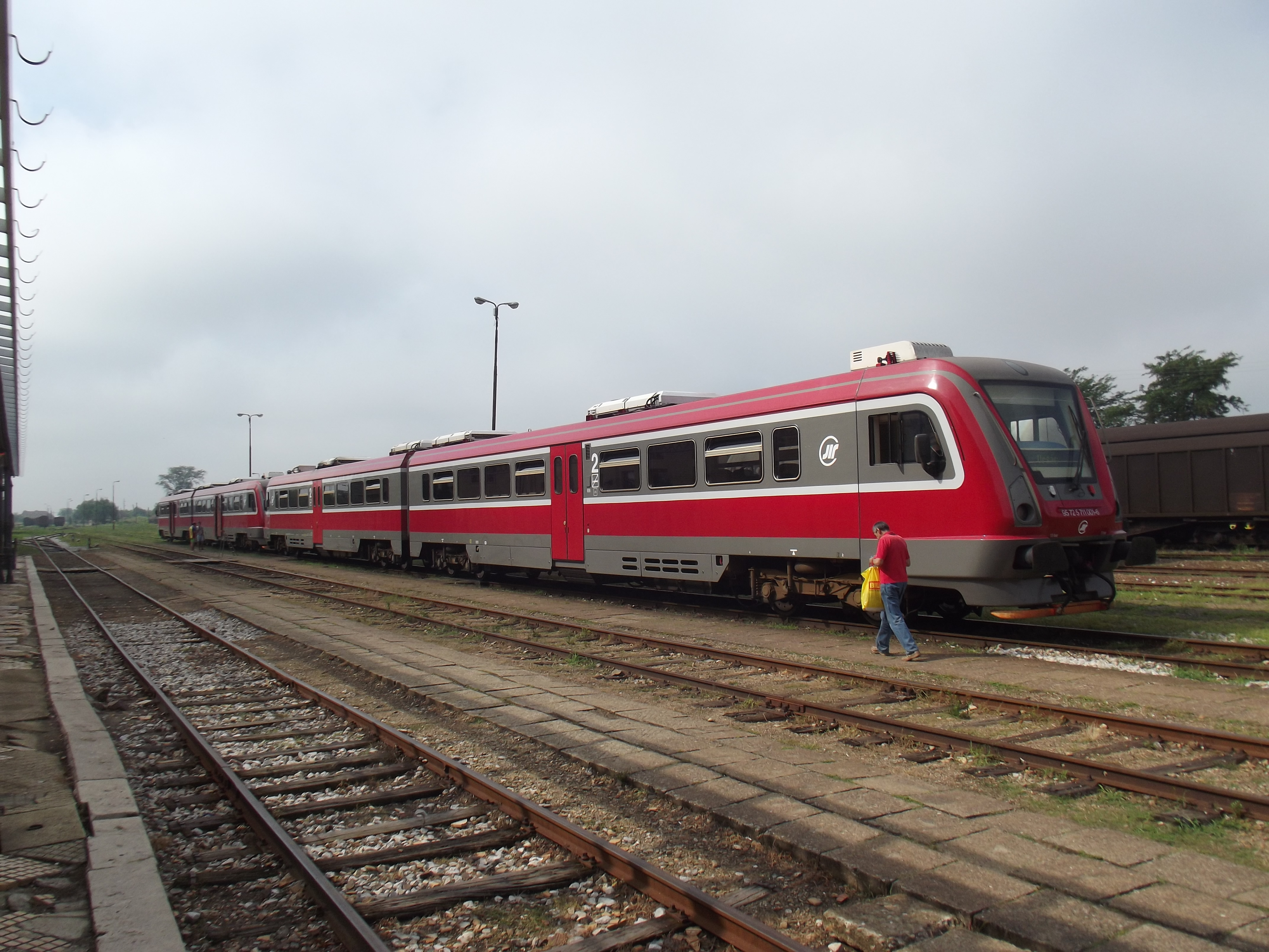 Aansluitende Servische trein in Vršac